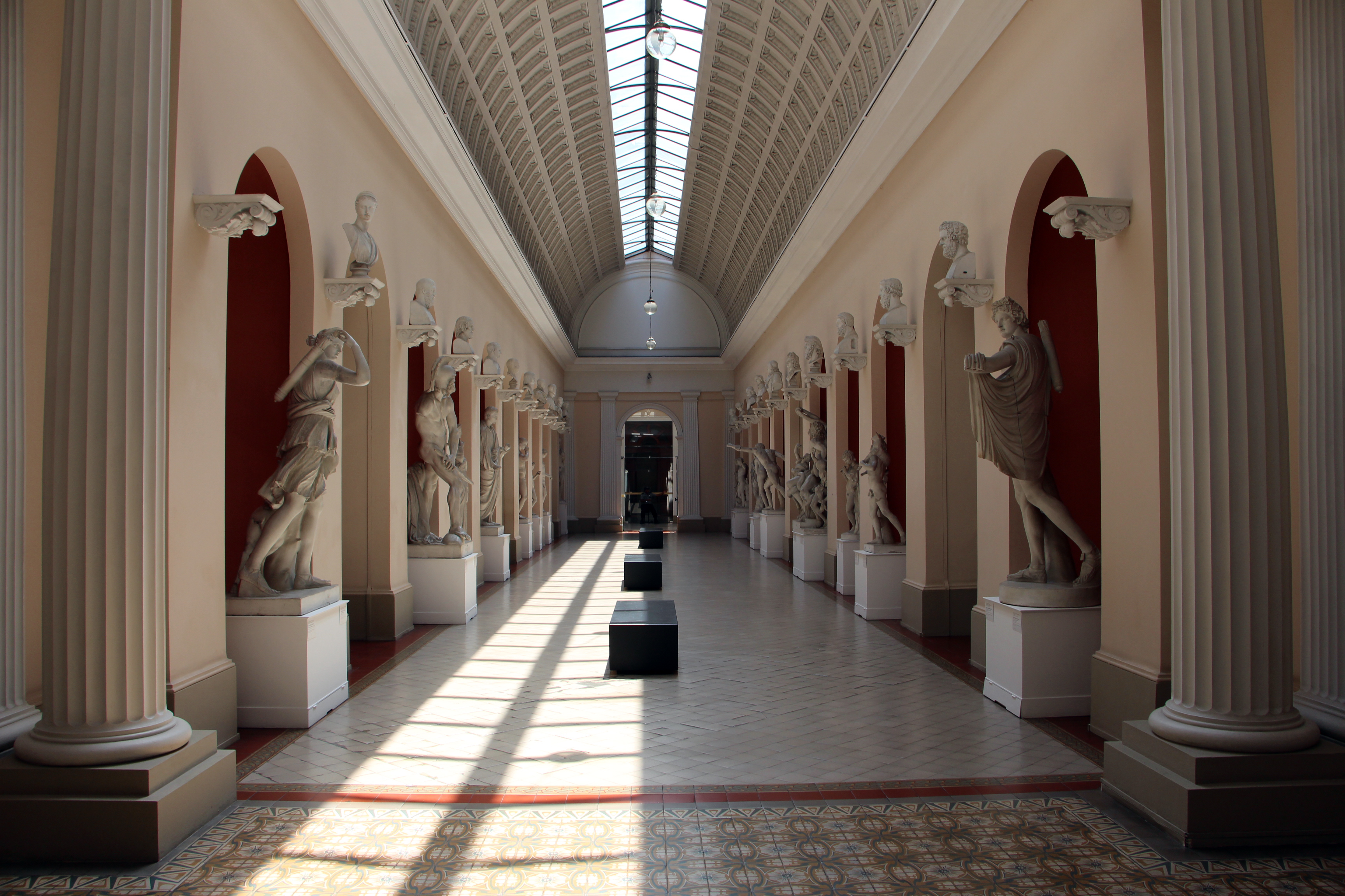 Museu Nacional de Belas Artes, Rio